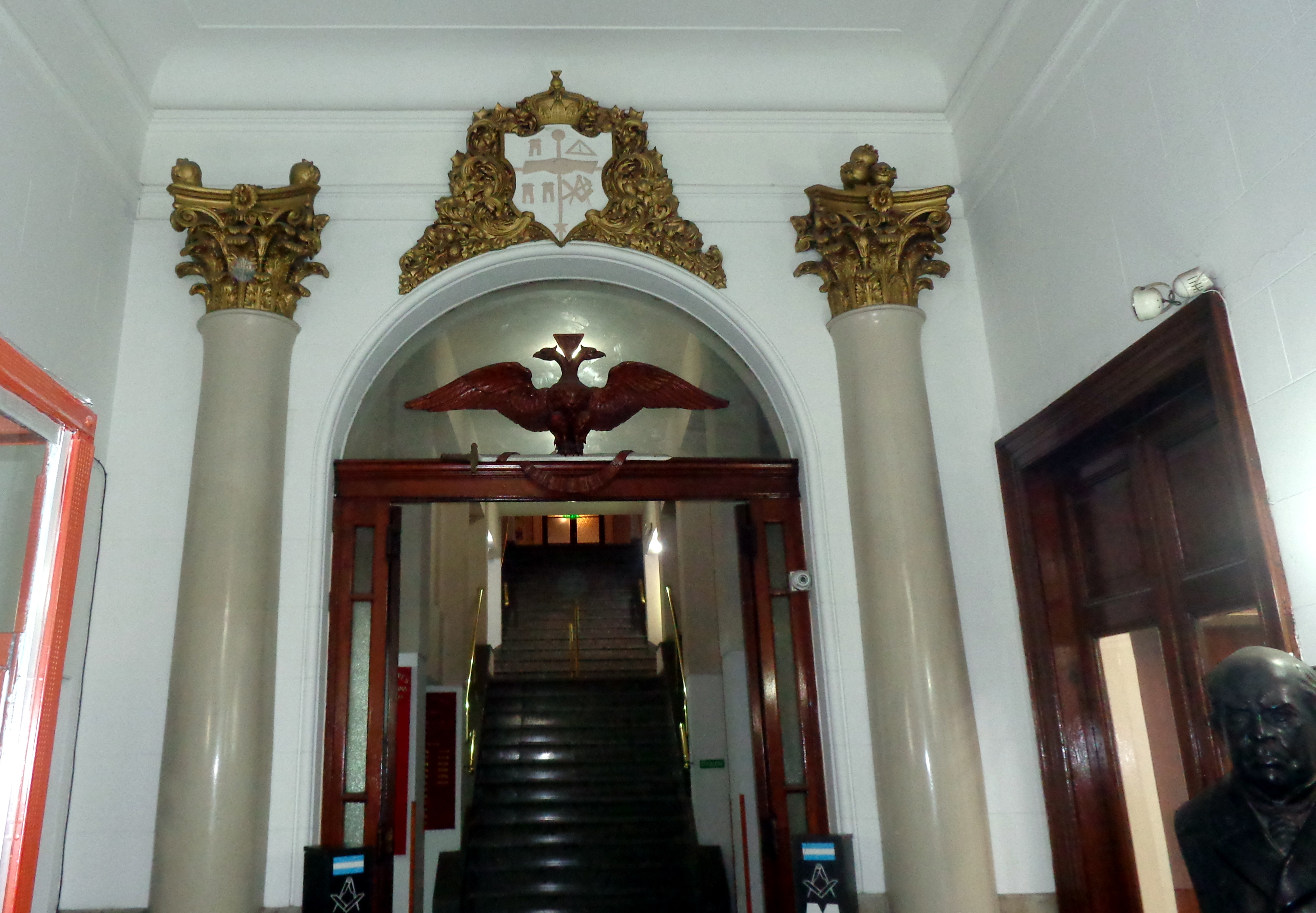 Sede de la Gran Logia Argentina de Libres y Aceptados Masones fue inaugurada el 3 de marzo de 1872. Calle Tte. Gral. Perón 1242, Barrio de San Nicolás, Buenos Aires, Argentina.